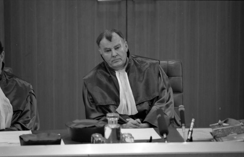 Am 17.1.1989 verhandelte der II. Senat des Bundesverfassungsgerichtes über die Verfassungmäßigkeit des Bundeshaushaltsgesetztes für 1981. Damals hatte die SPD/FDP-Koalition die Kreditermächtigung für den Haushalt um 1,9 Milliarde DM höher angesetzt als die für Investitionen vorgesehenen Ausgaben.